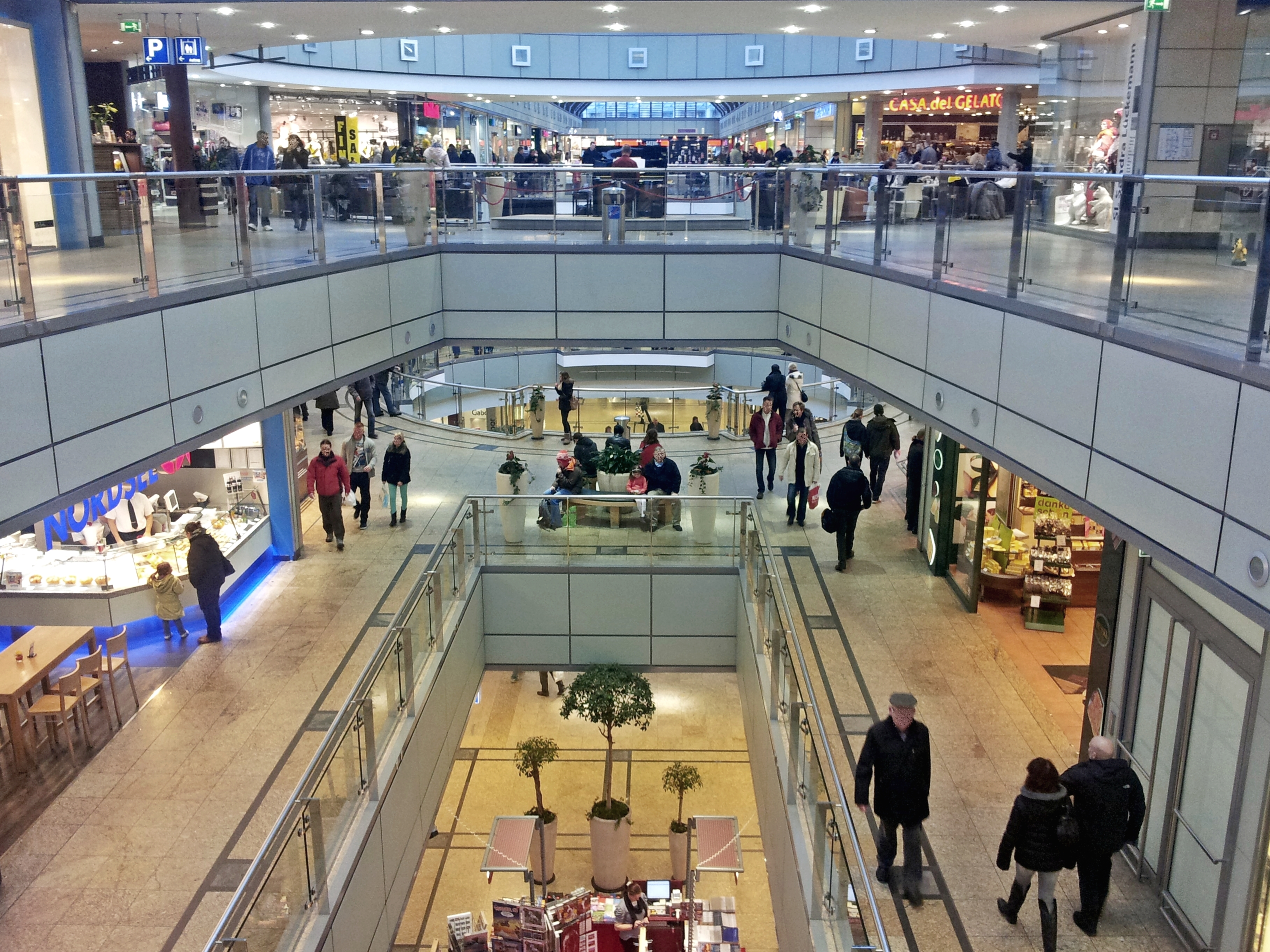 Allee-Center Magdeburg Innenansicht 2013